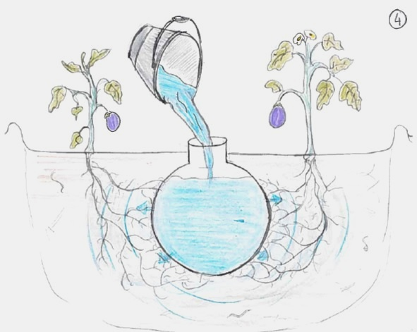 Remplissage d'une jarre d'irrigation